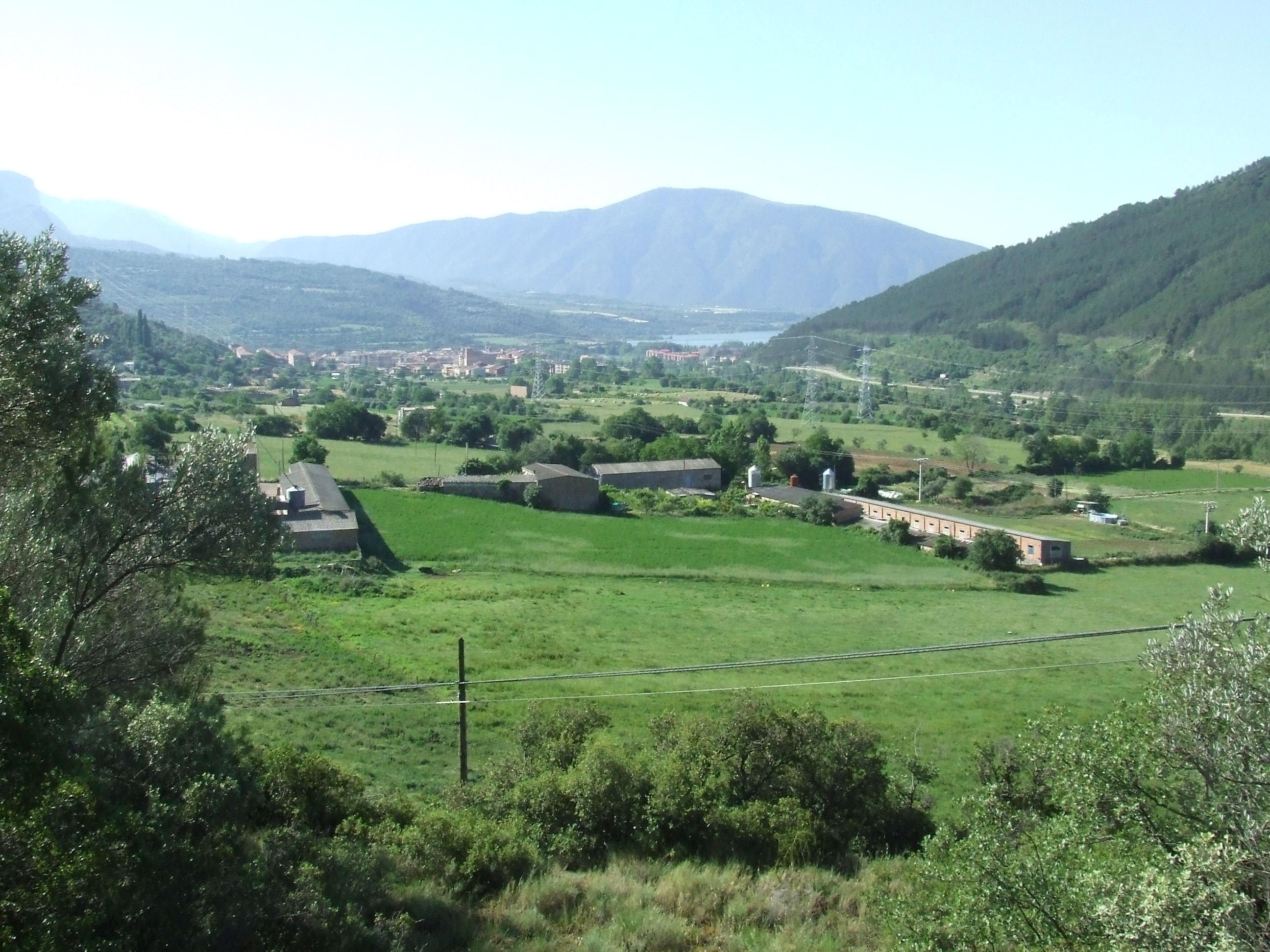 La riba esquerra del Flamisell (la Pobla de Segur, Pallars Jussà)